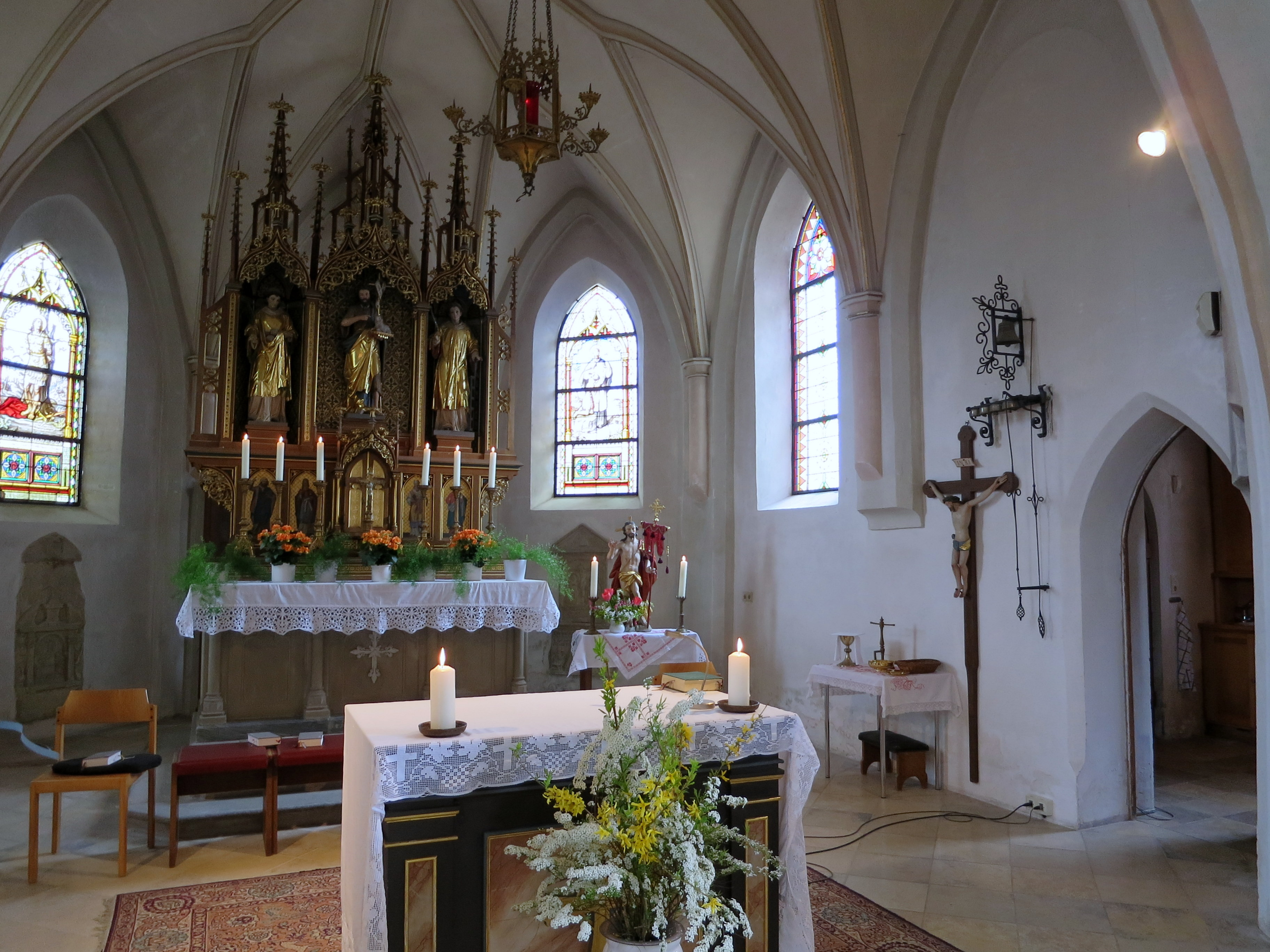 Eine schön ausgestattete Filialkirche St. Laurentius im Ortsteil Viehbach von Fahrenzhausen